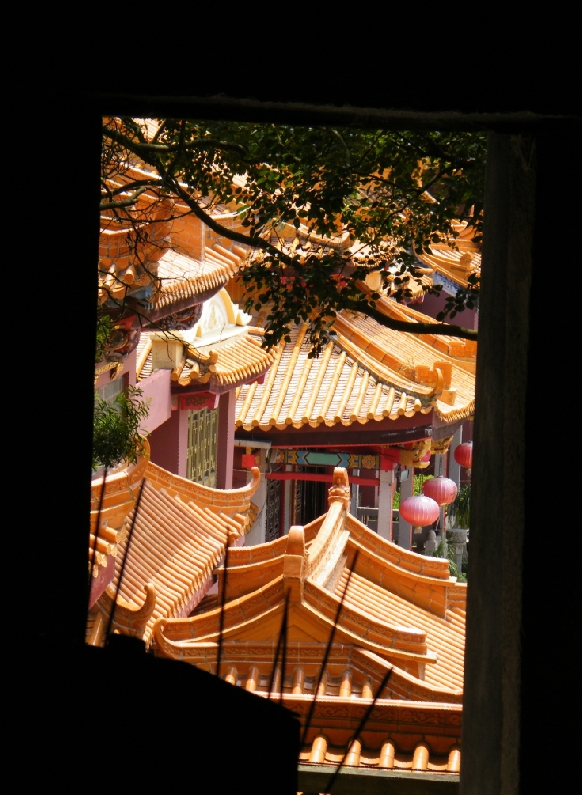 青云岩外青云禅寺